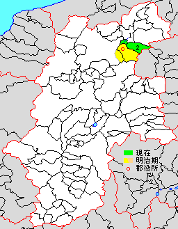 長野県上高井郡の位置